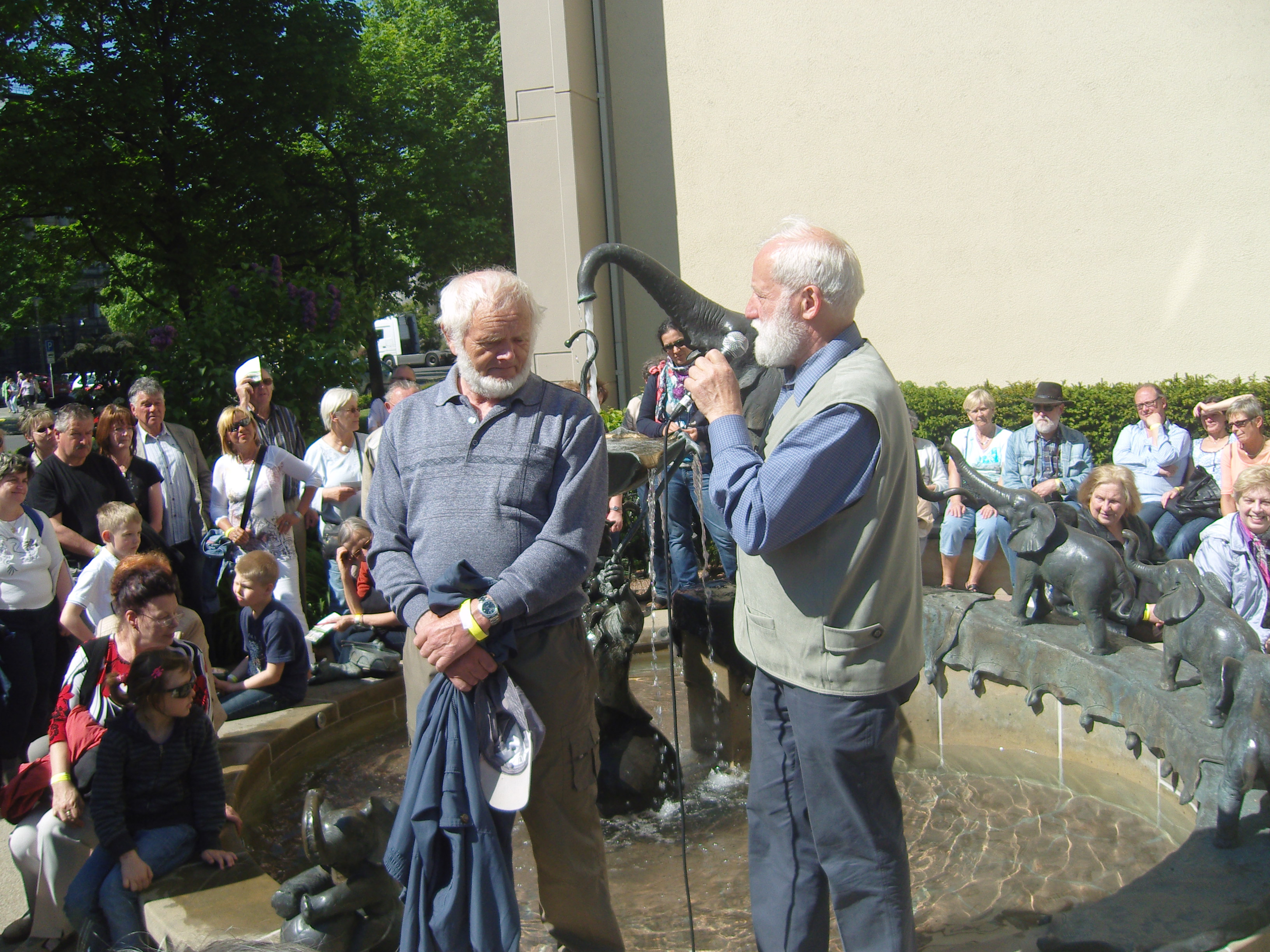 Vinzenz Wanitschke und Springbrunnenbauer Eberhard Grundmann beim Brunnentag 2011 in Dresden vor dem Zirkusbrunnen